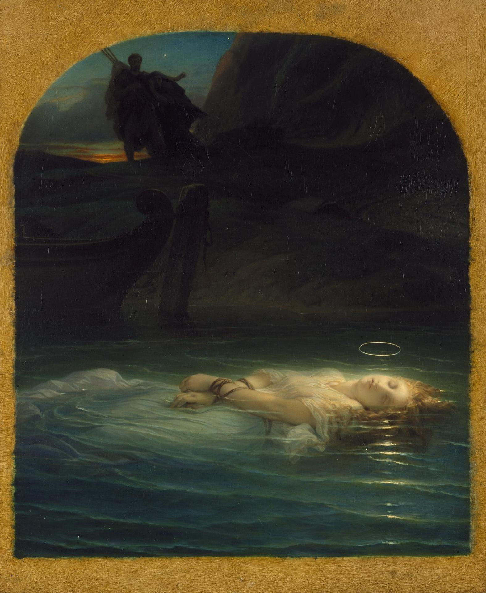 Деларош, Ипполит (Поль). 1797-1856 Христианская мученица времен Диоклетиана в Тибре Франция, 1853 г. Тема картины, задуманной художником в период тяжелой болезни, связана с эпохой гонений на христиан в годы правления императора Диоклетиана (284-305). Эффектный контраст багряного заката и холодных сине-зеленых струй воды с рефлексами от мистического света, излучаемого ликом мученицы, брошенной в Тибр со связанными руками, придает картине романтическое звучание. Современник Делароша, писатель Теофиль Готье, который назвал этот женский образ "христианской Офелией", особенно восхищался ее лицом "девственной чистоты и божественной красоты".